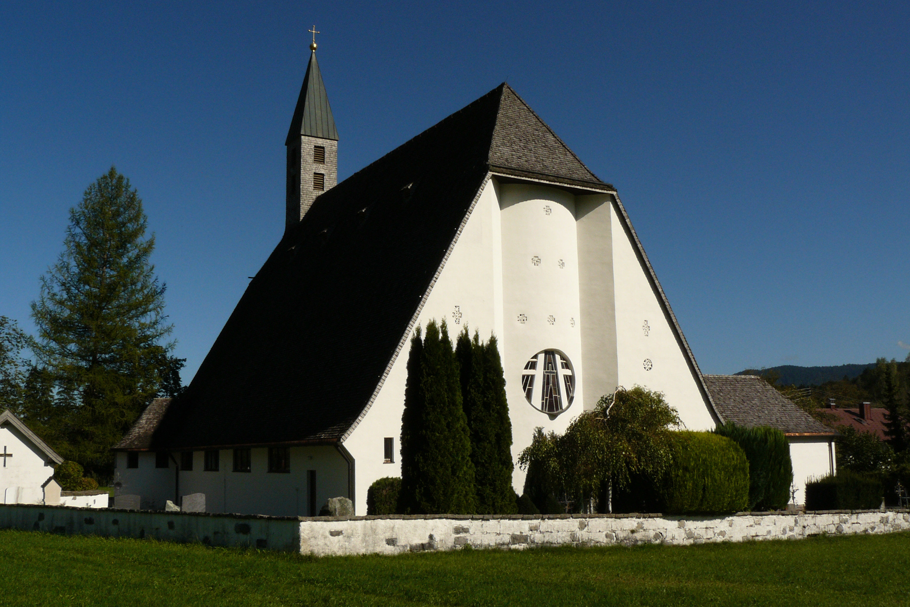 Pfarrkirche Sankt Ulrich, Ringstraße 9, Walchensee. Ansicht von WNWThis is a photograph of an architectural monument.